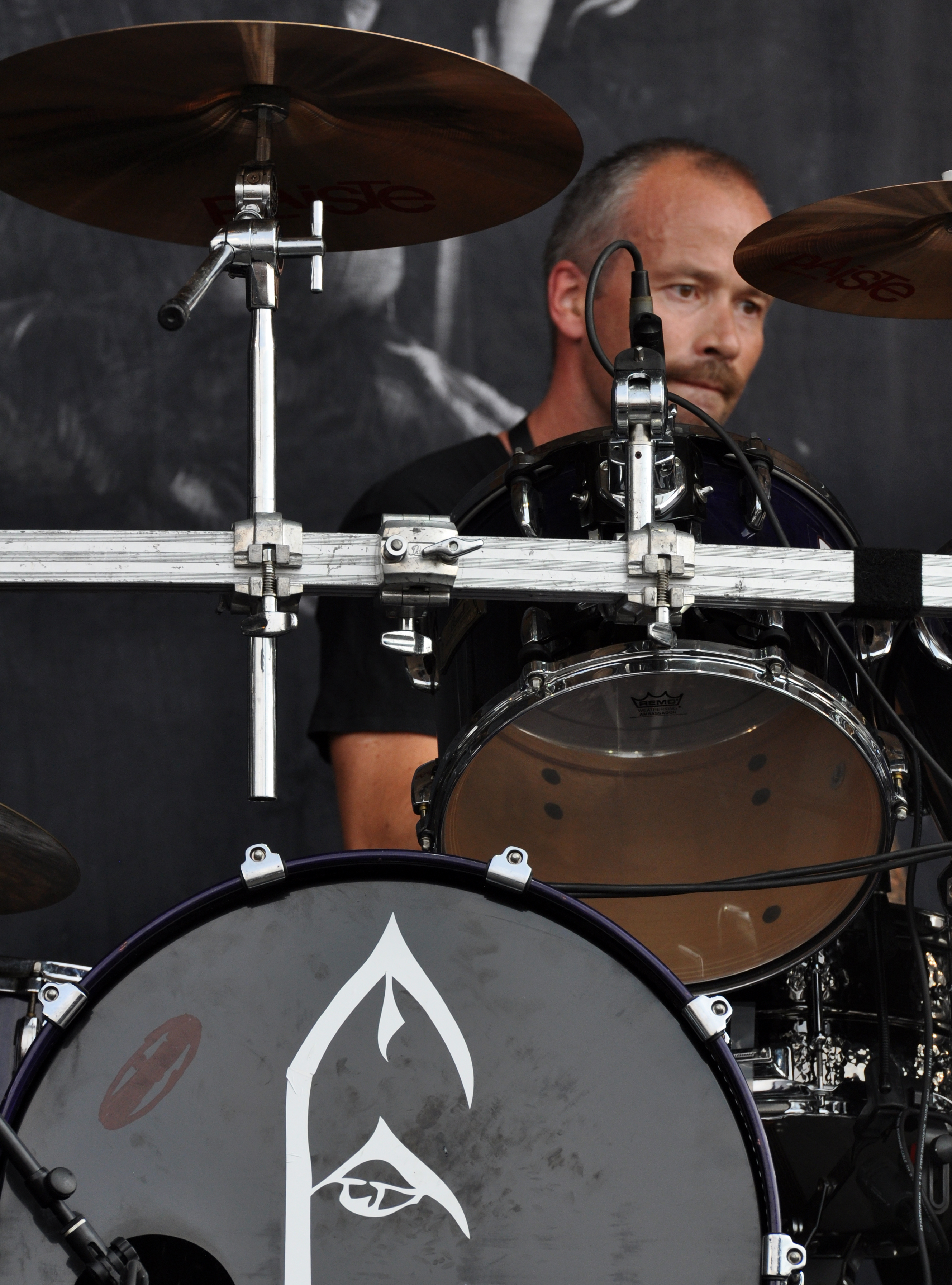 02-08-2014-Bård G. Eithun with Emperor at Wacken Open Air 2014-JonasR 02